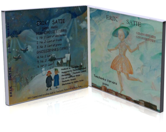 Картины для оформления были куплены у Дмитрия Козлова. Тираж 500 штук. 2003 год.